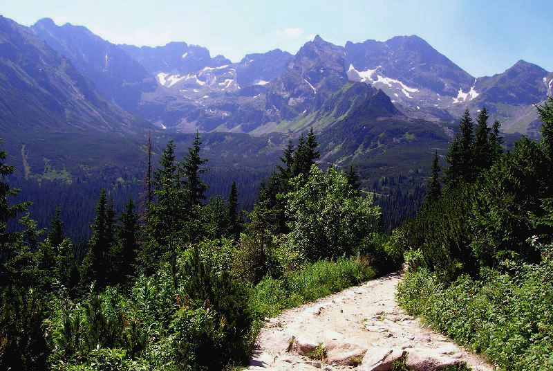 Tatry - w drodze do Murowańca.